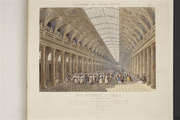 Vue intérieure du cirque du Palais Royal lors de la visite des ambassadeurs de Tipu Sultan. Tiré de l'histoire du Palais Royal (1834).